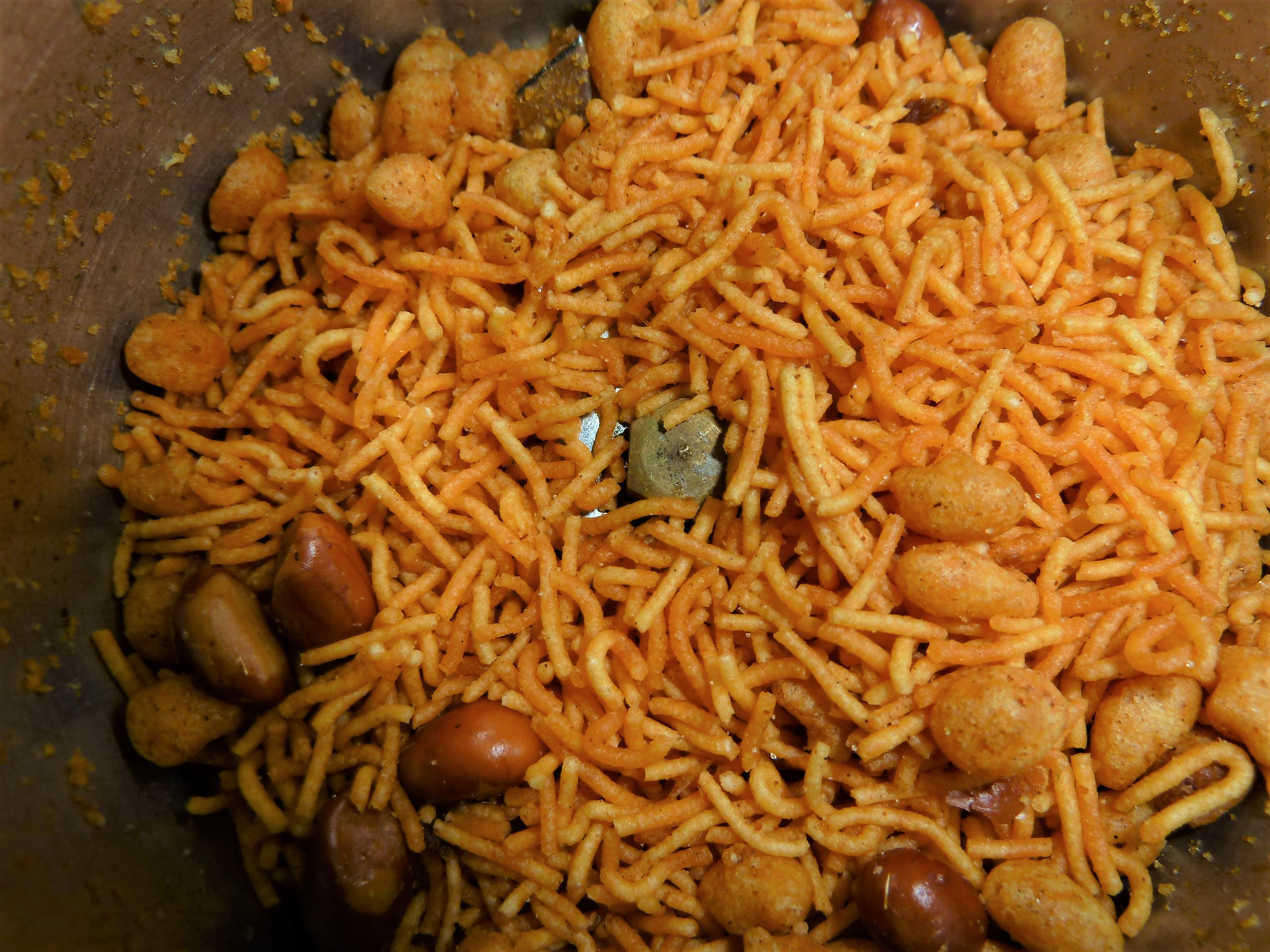 మిక్చర్